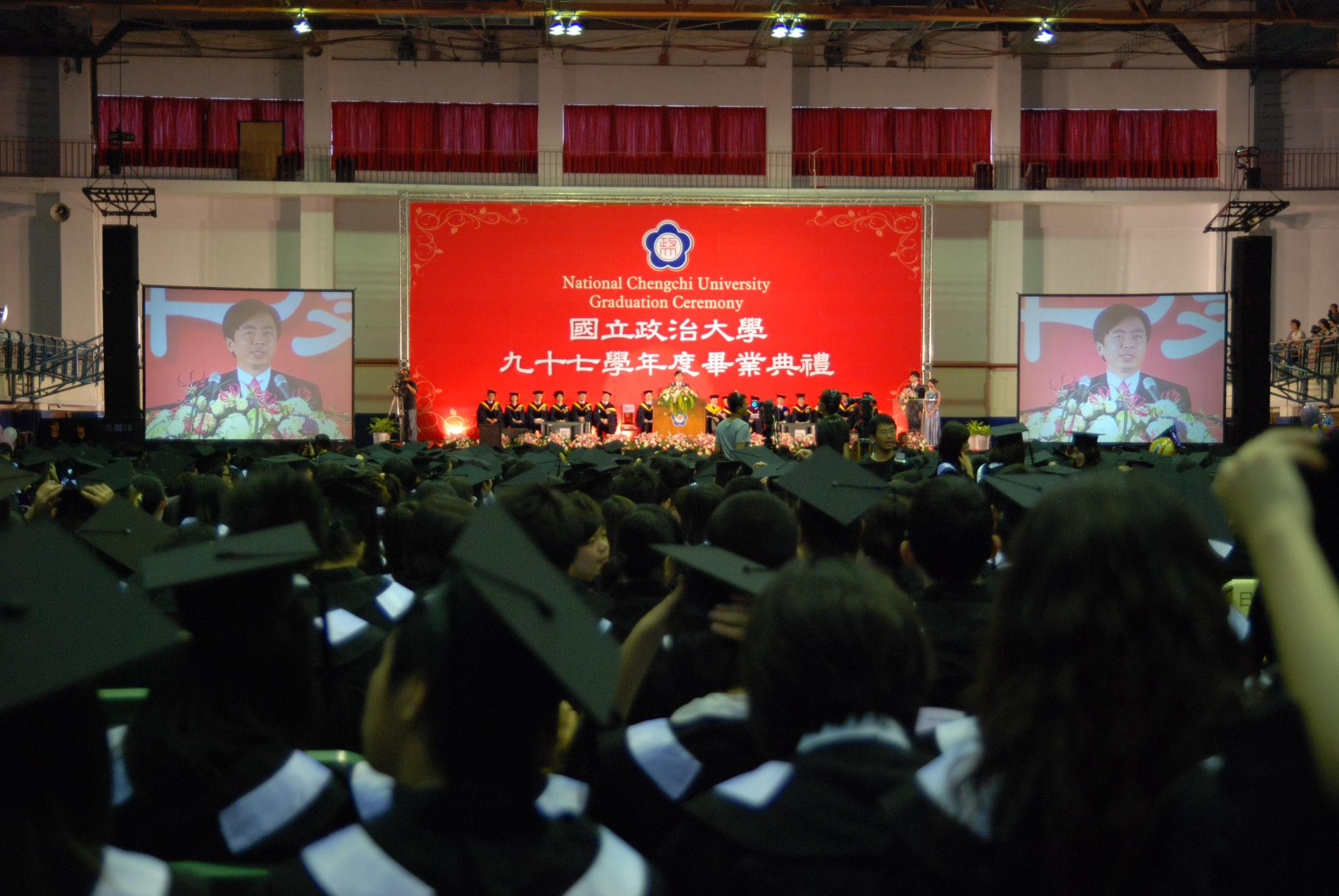 中文（台灣）: 國立政治大學九十七學年度畢業典禮。